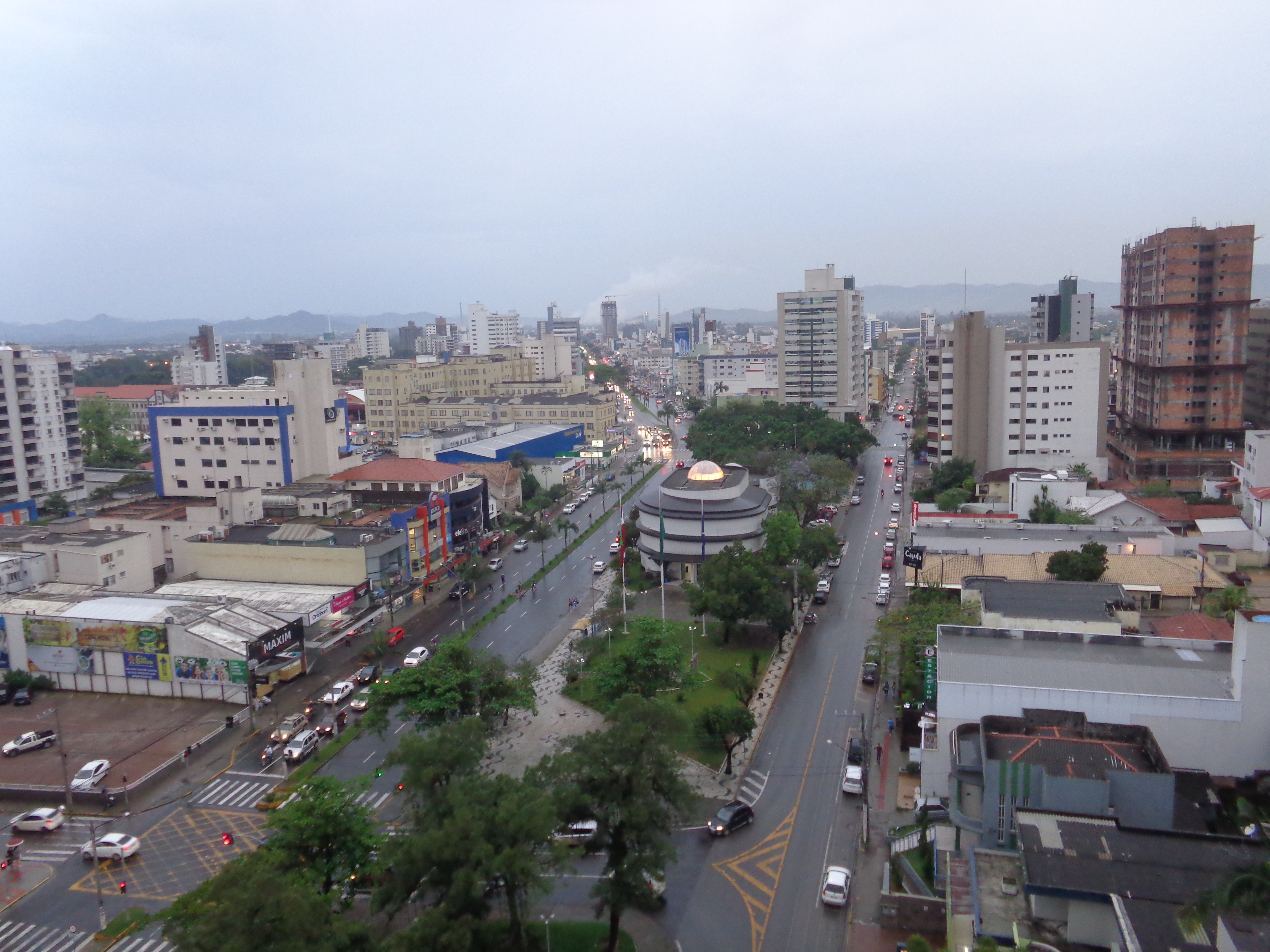 No centro da fotografia o Museu Willy Zumblick Tubarão, fotografado a partir do Edifício Lomar, 7º andar.